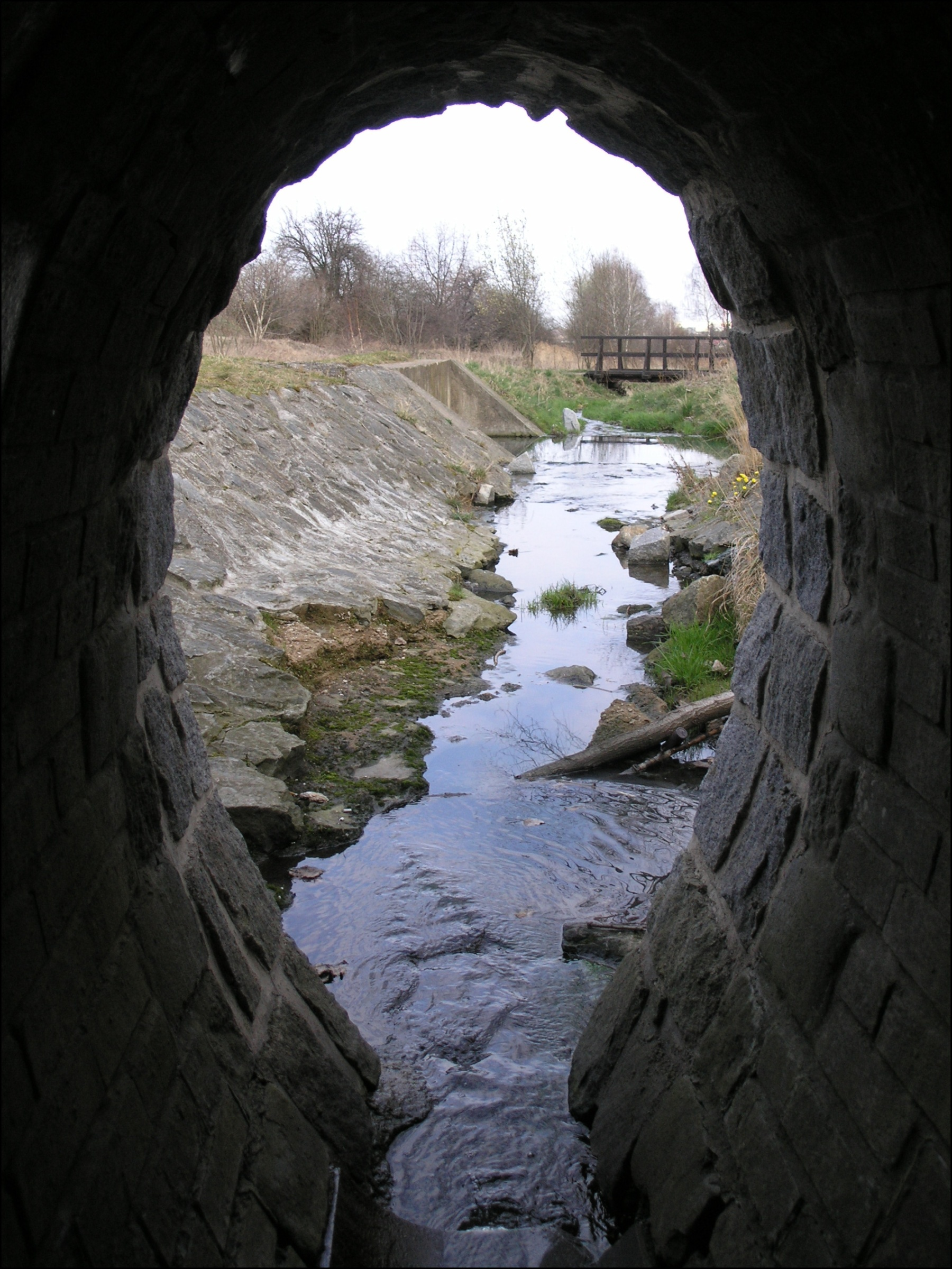 Motolský potok v Praze